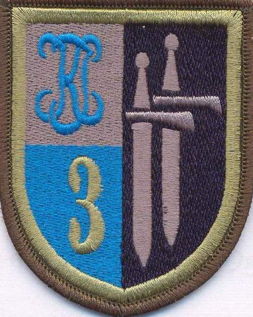 Naszywka hatowana 3 Batalionu Rozpoznawczego w Giżycku